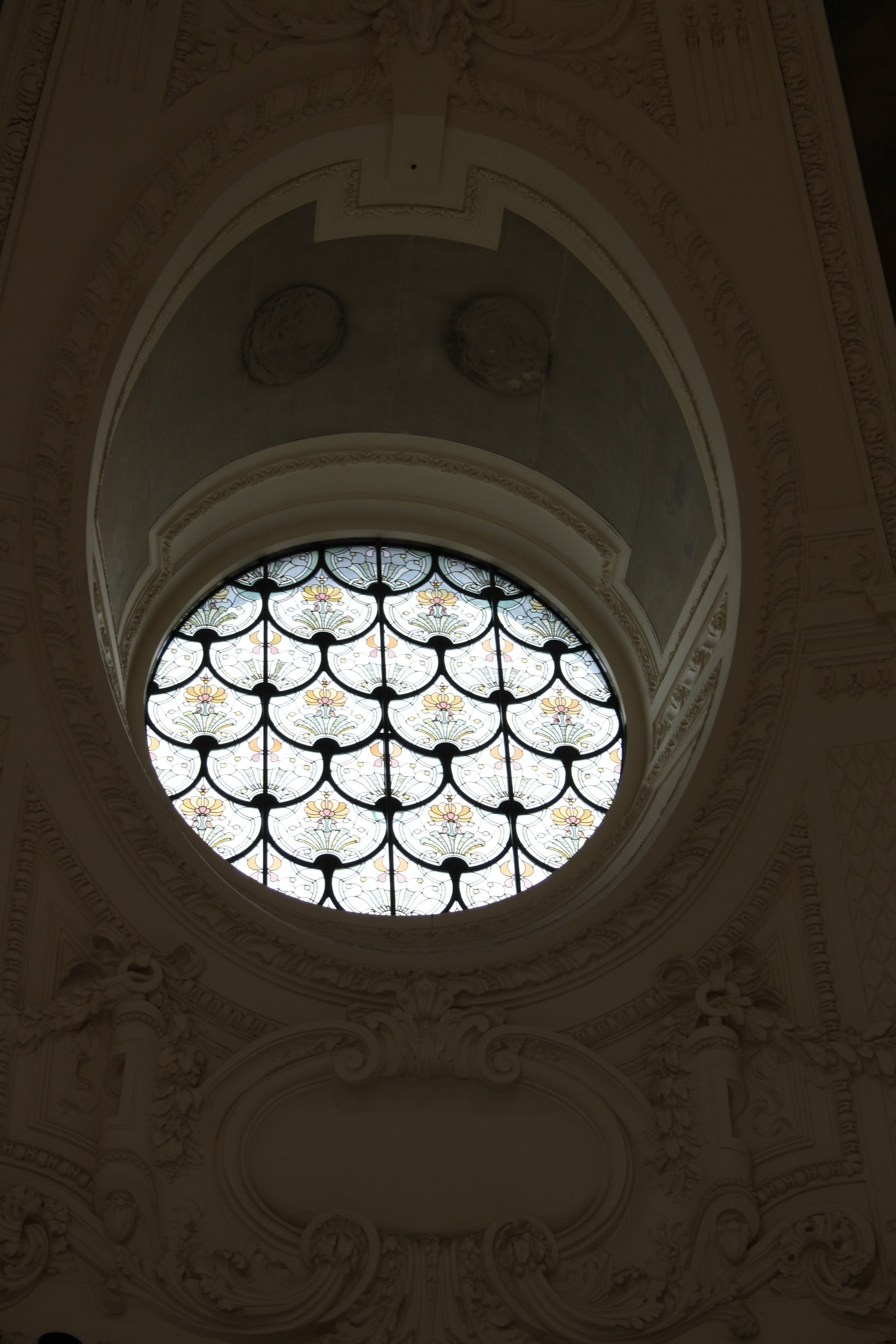 Okulus im Dach des Vestibül des Petit Palais in Paris; Hersteller des Bleiglasfensters: Charles Champigneulle